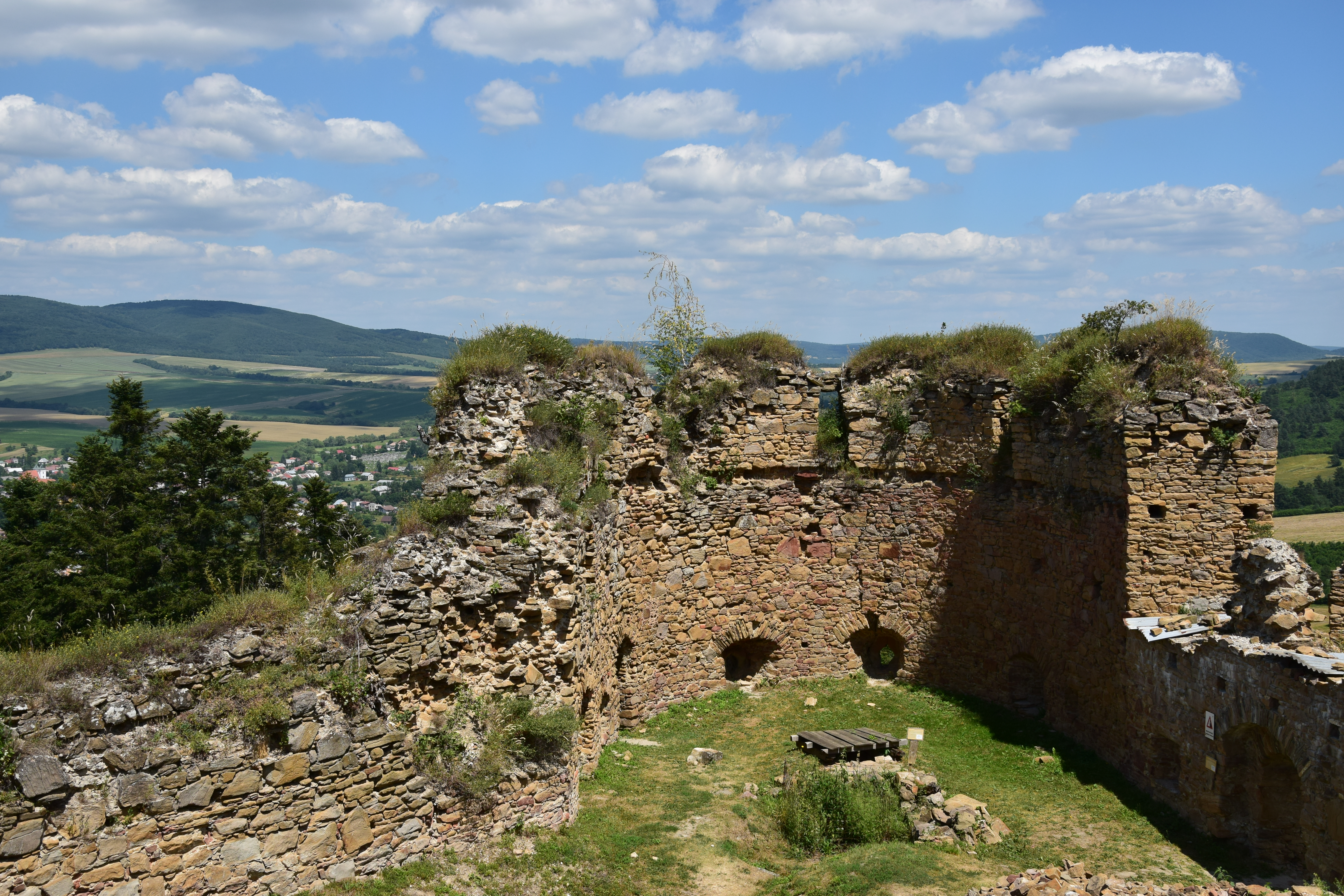 Zborov – bašta horního hradu